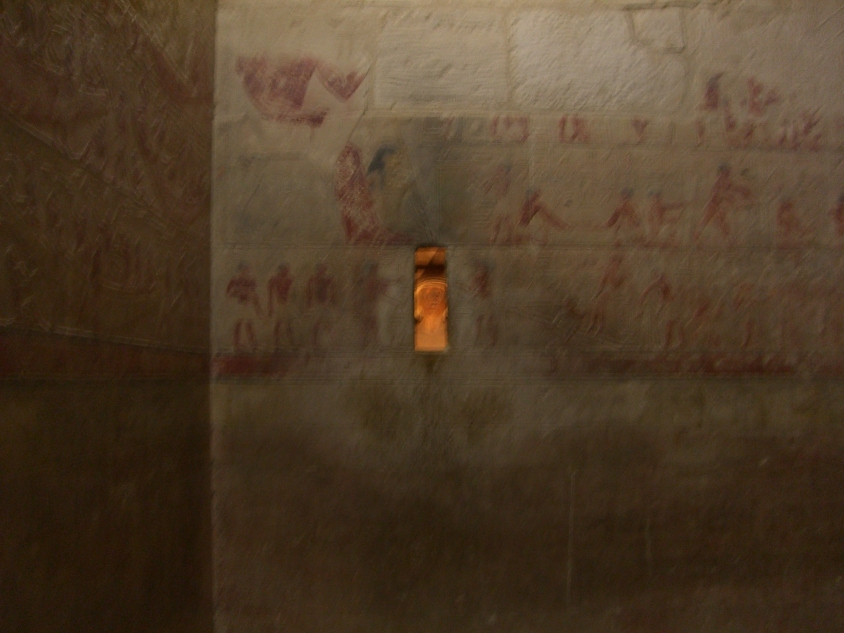 Salle principale du mastaba de Ti avec au fond le serdab - Saqqarah ; Ve dynastie égyptienne